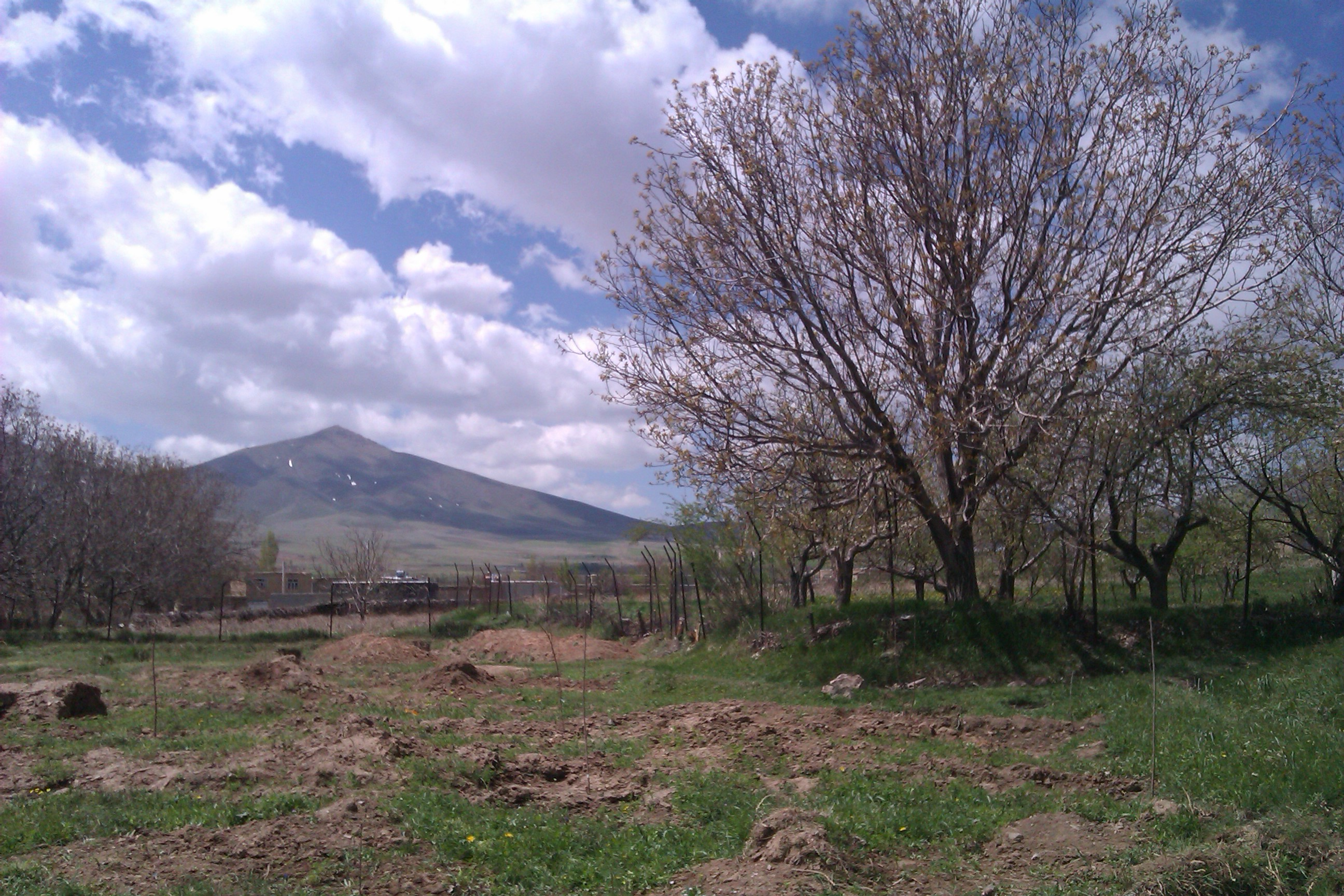 نمایی از کوه سیاهتیر در روستای ییلاقی فرج آباد